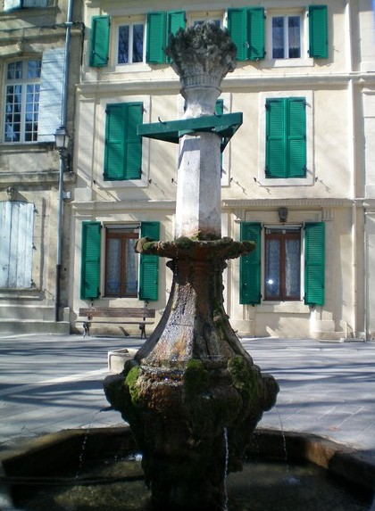 La fontaine de Grans